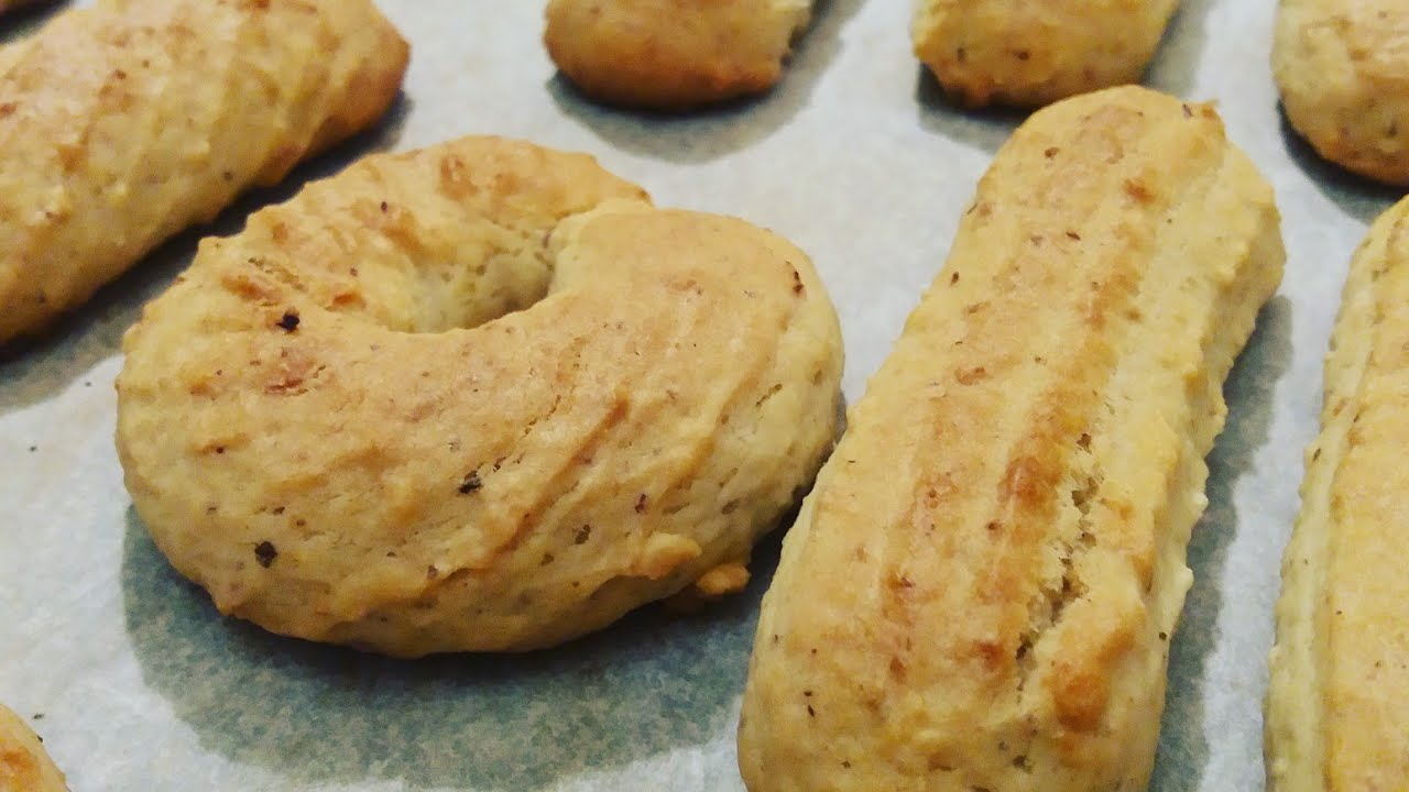 صورة لحلوى البشكوطو